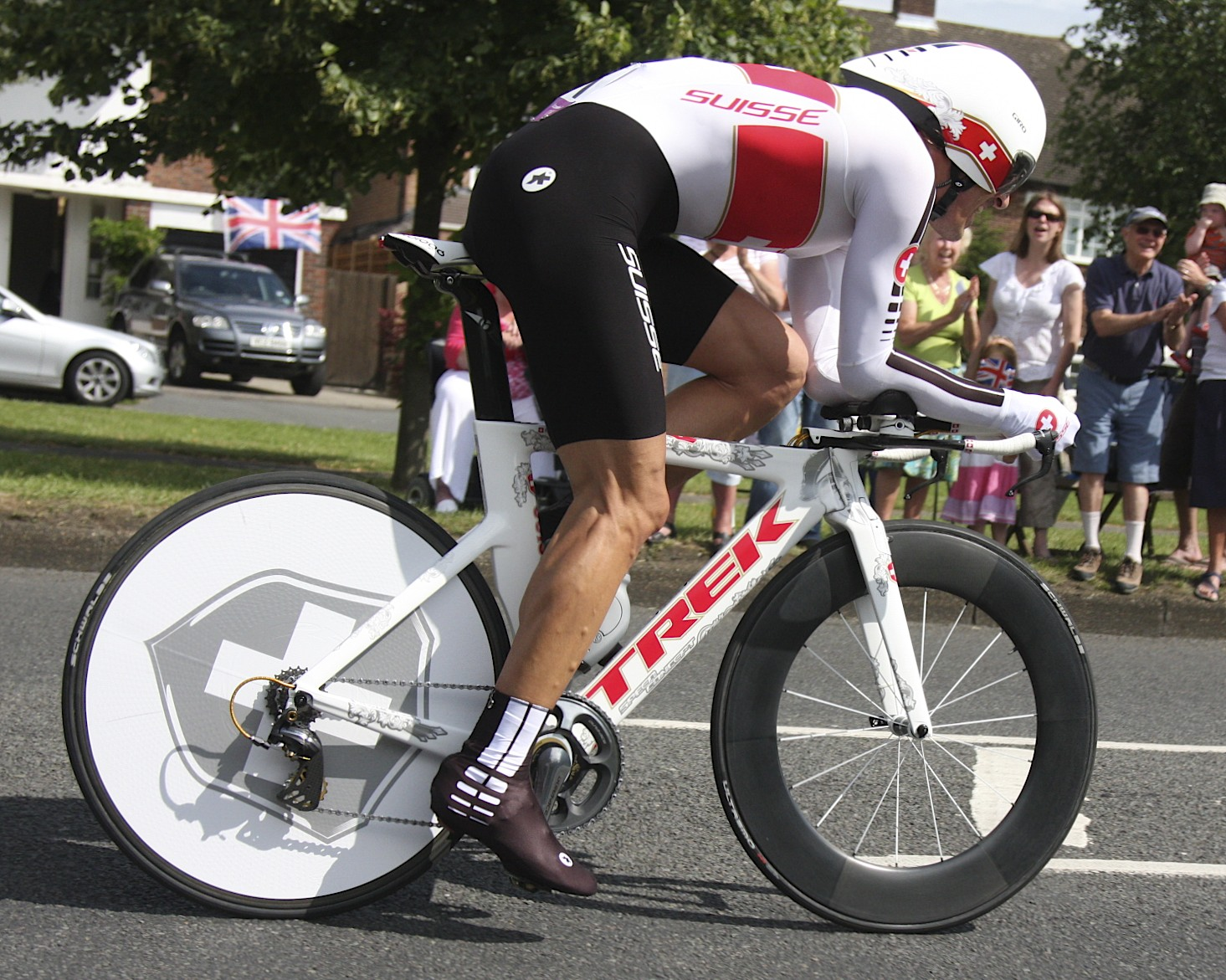 Fabian_Cancellara_SUI